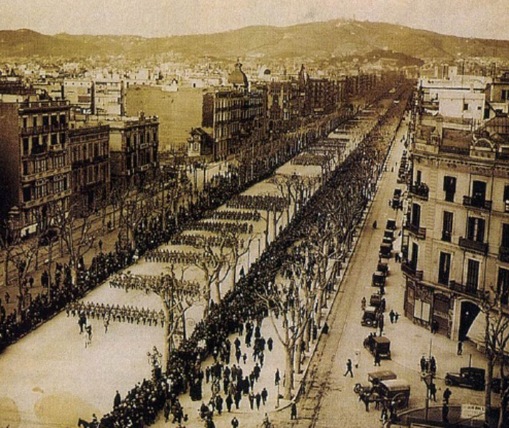 Desfile militar en el paseo de Gracia (1925).